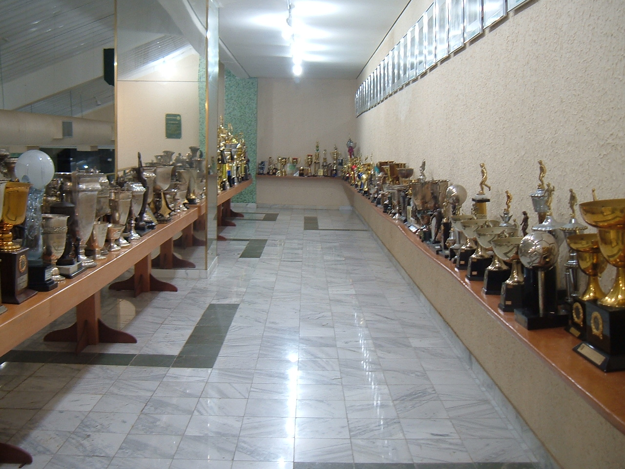 Trofeus conquistados pelo Palmeiras em diversas modalidades esportivas